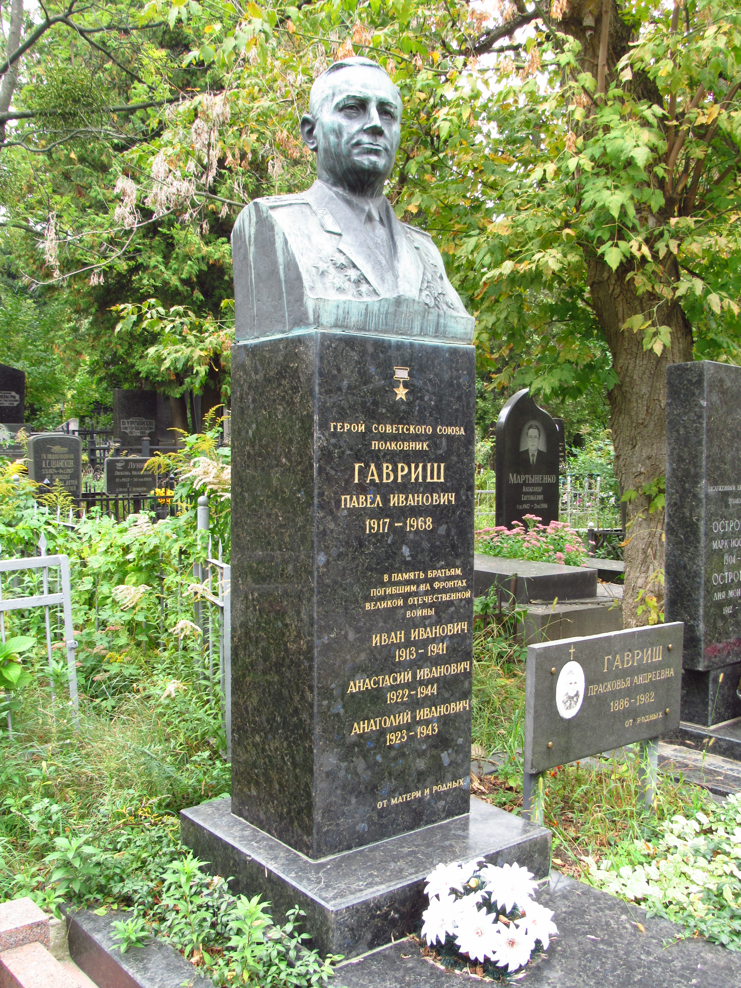 Могила Гавриша П. І., Героя Радянського Союзу, Київ, Байкова вул., 6, діл. 46